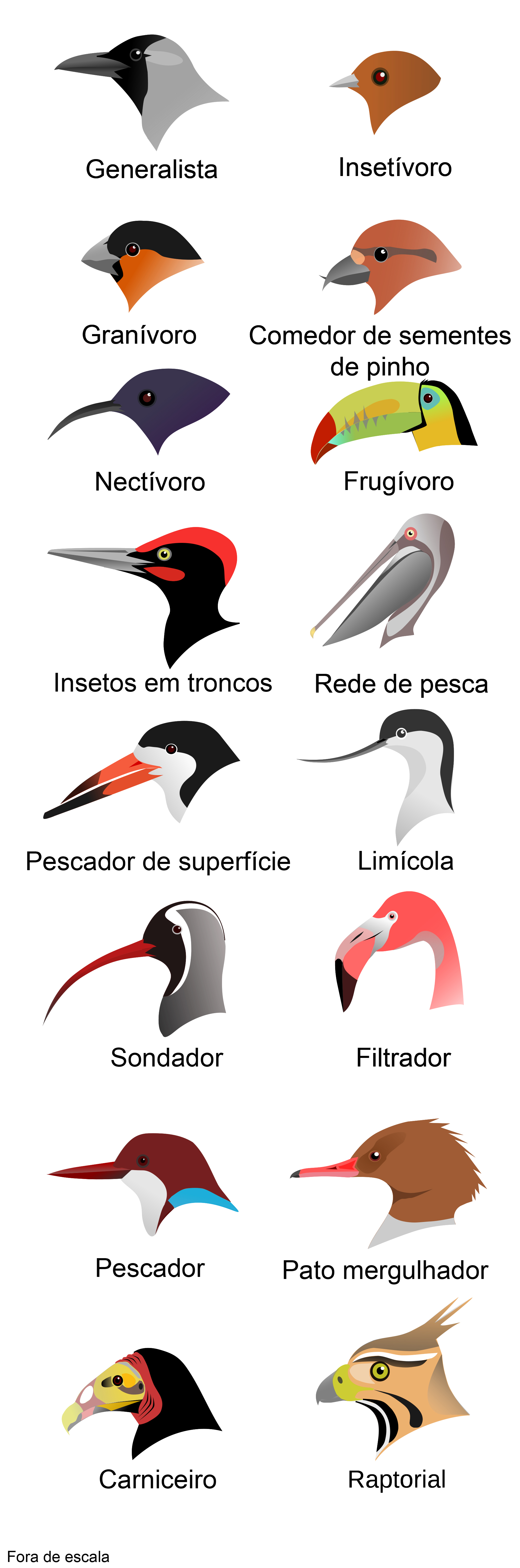 Alguns tipos de bicos de aves